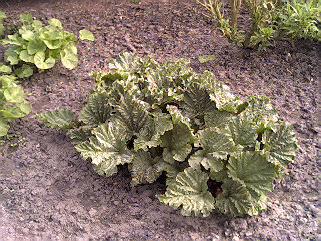 Rabarber. Serie foto's van een rabarberplant van 25 maart 2005 tot en met 13 mei 2005, één foto per week. Bestandsnamen: Rabarber-serie-1.jpg tot Rabarber-serie-8.jpg. Foto zelf gemaakt. Public Domain.